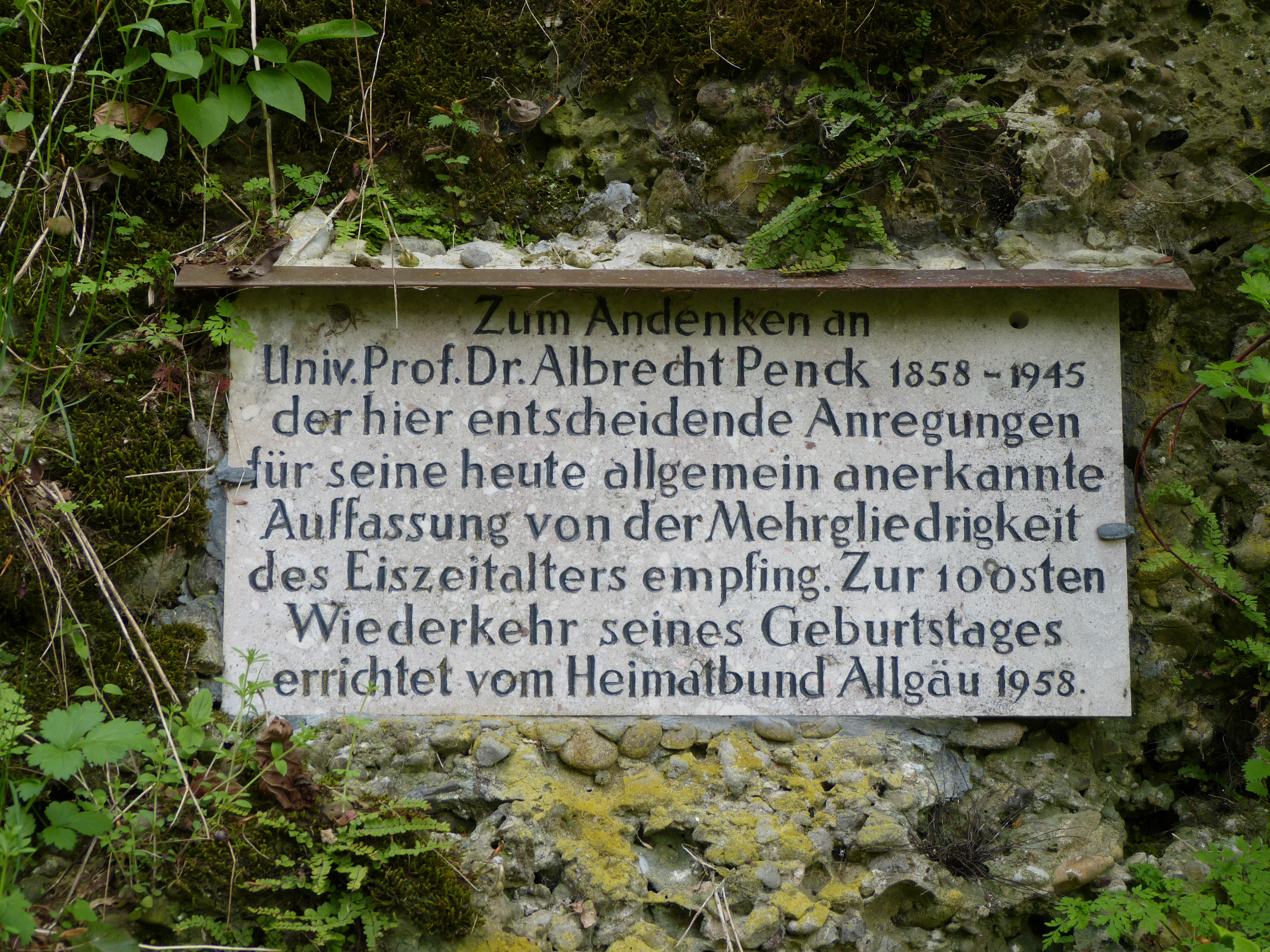 Gedenktafel für Albrecht Penck bei Ittelsburg, Landkreis Unterallgäu, Bayern